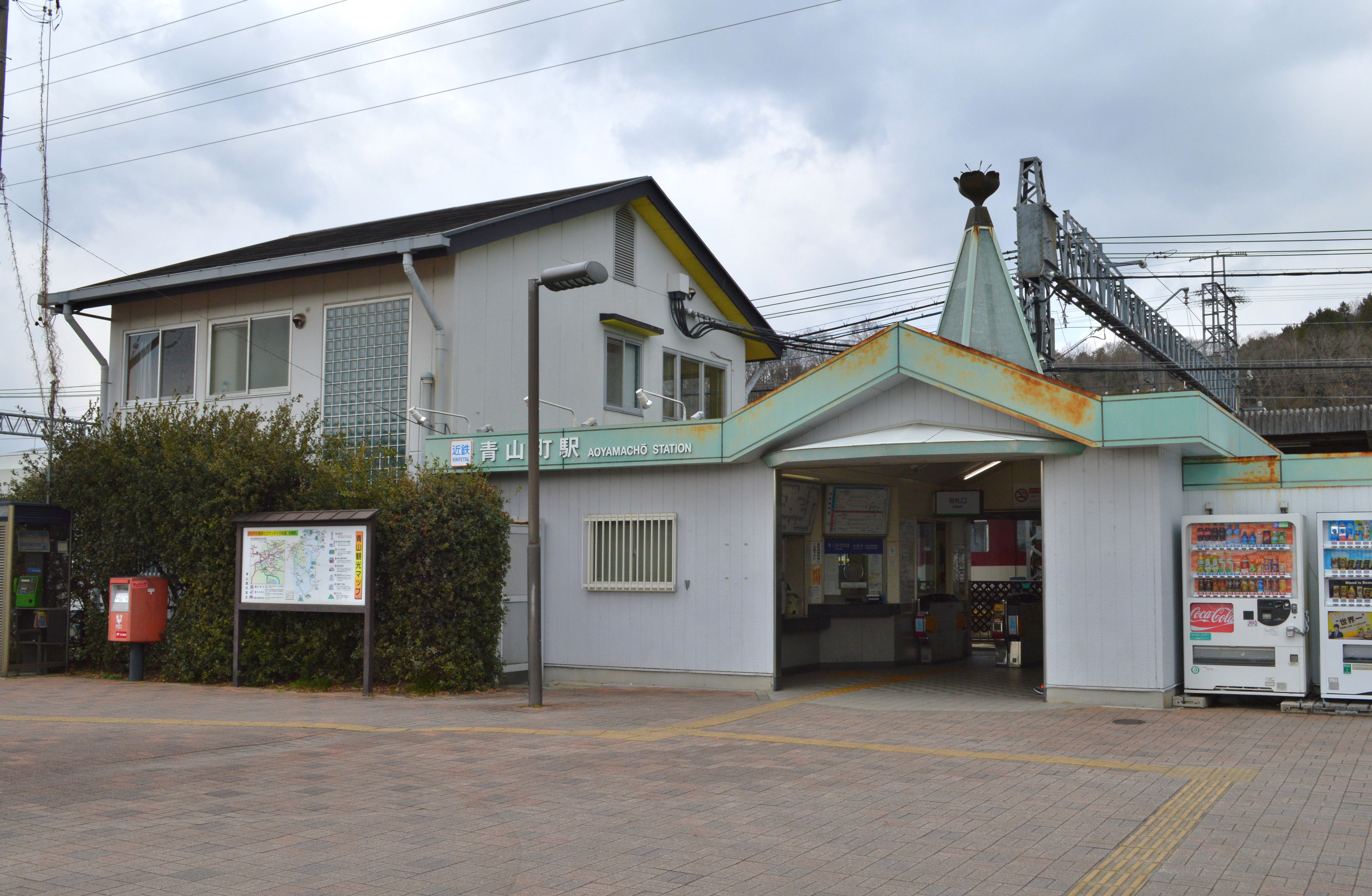 青山町駅 駅舎